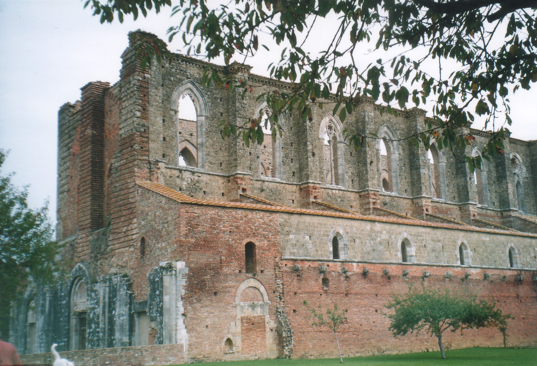 Abbazia S. Galgano, lato ovest.